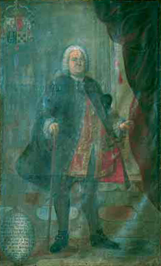 Retrato de Juan Antonio de Tagle-Bracho